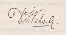 Unterschrift von Jakob Vetsch von 1913 (Archiv des Schweizerischen Idiotikons, Zürich).